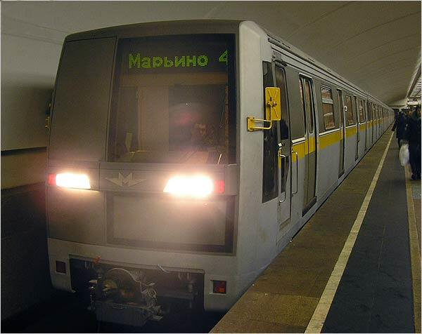 Car 81-720